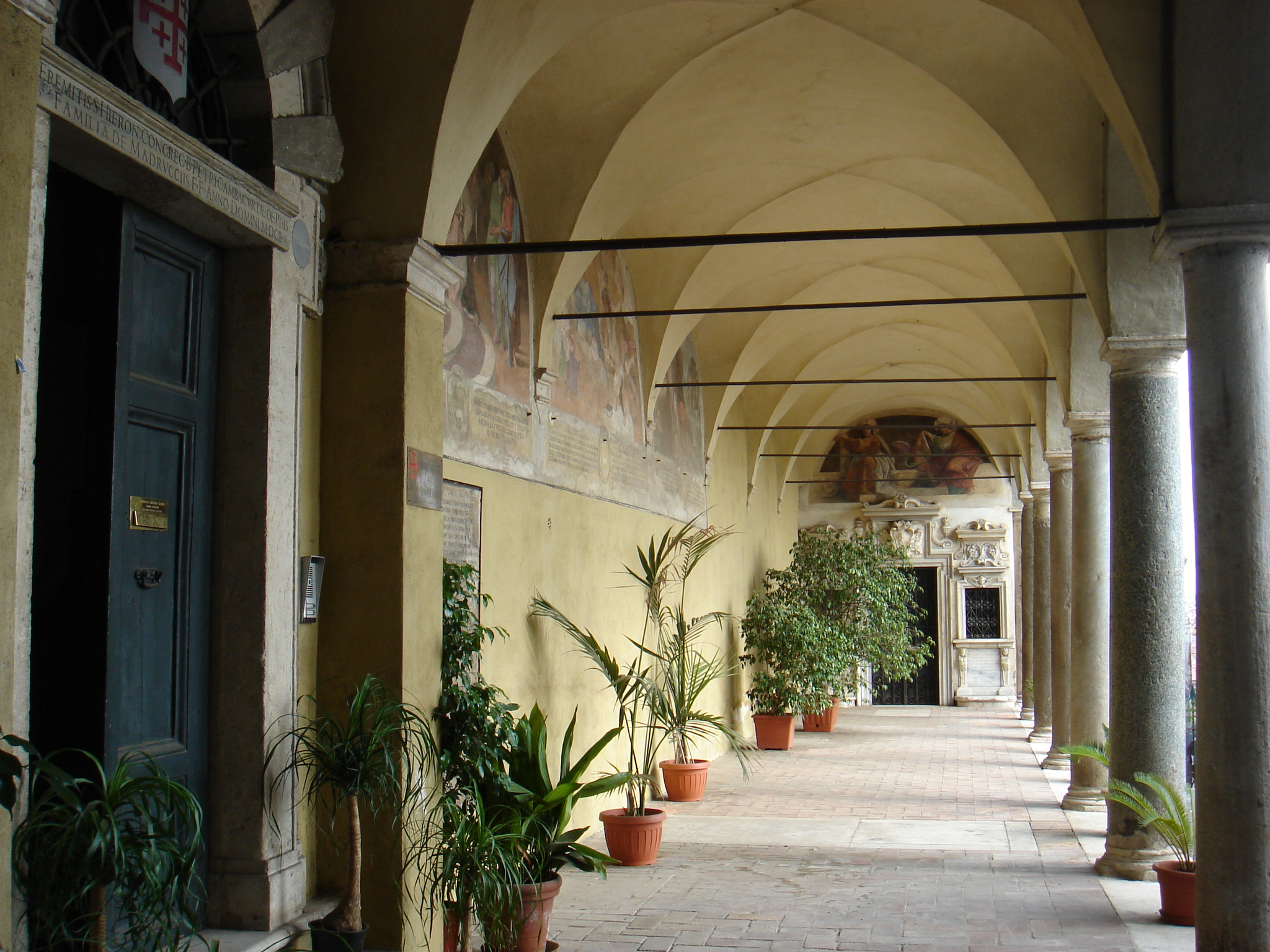 Roma, sant'Onofrio al Gianicolo: portico esterno: in fondo, la cappella del Rosario